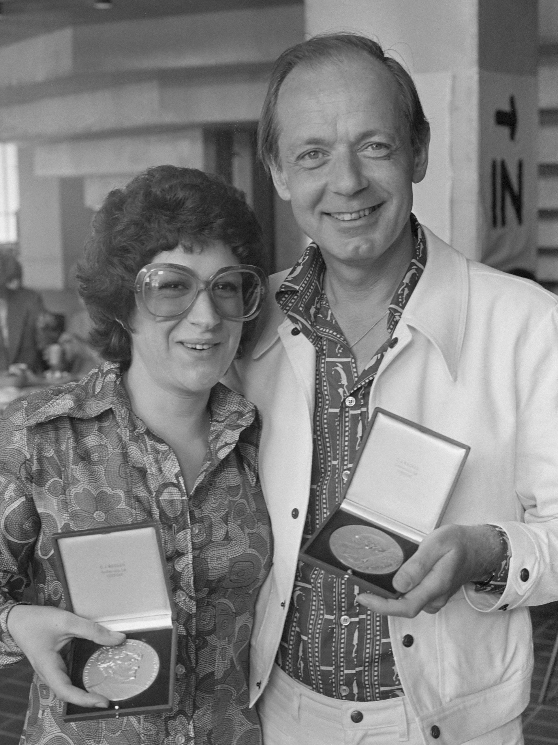 Toneelprijzen uitgereikt in Groningen: Sacha Bulthuis en Siem Vroom met toneelprijzen 17 mei 1974